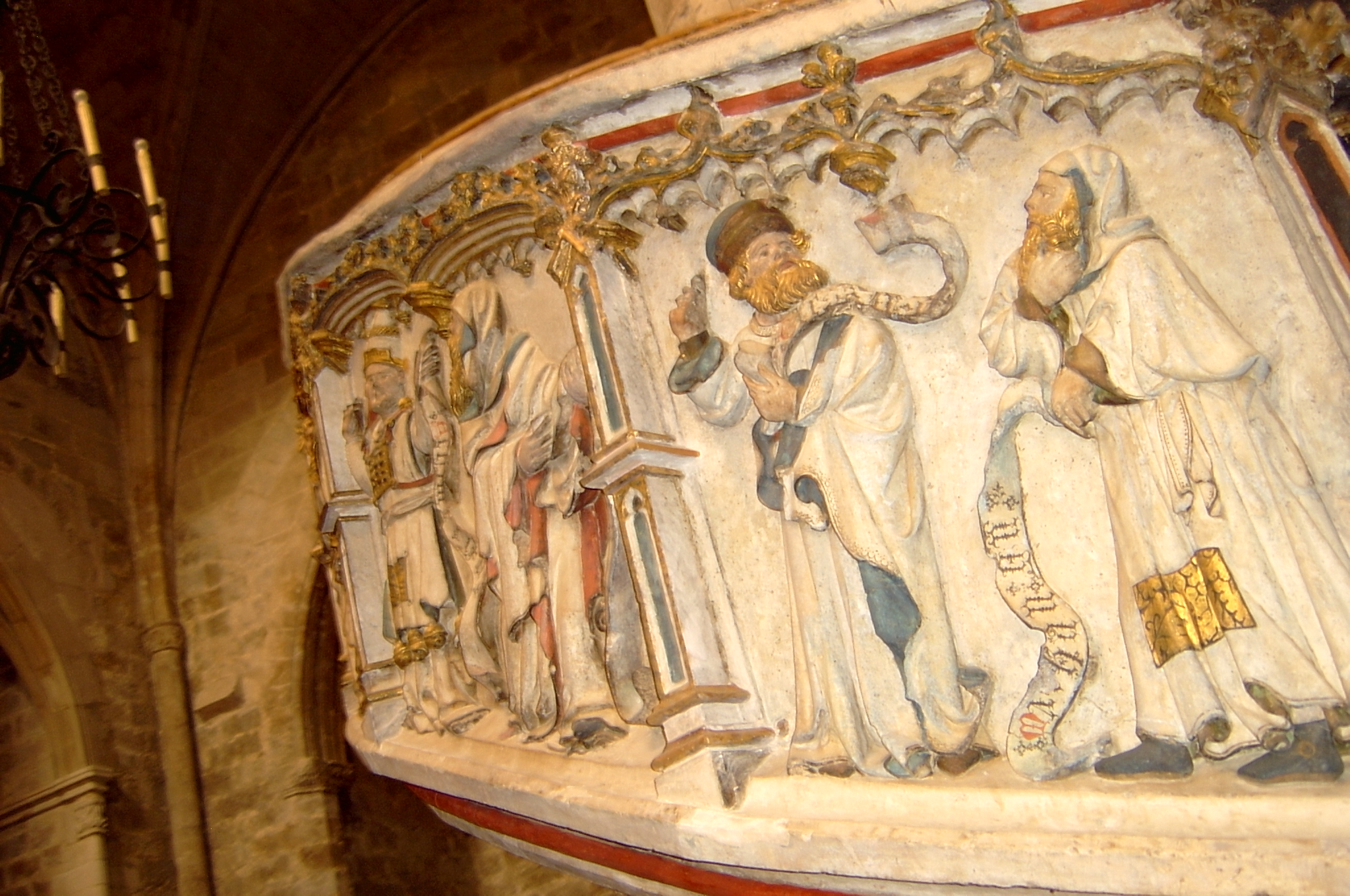 Púlpito de la iglesia arciprestal de Morella. Fotografia tomada en Junio de 2005.